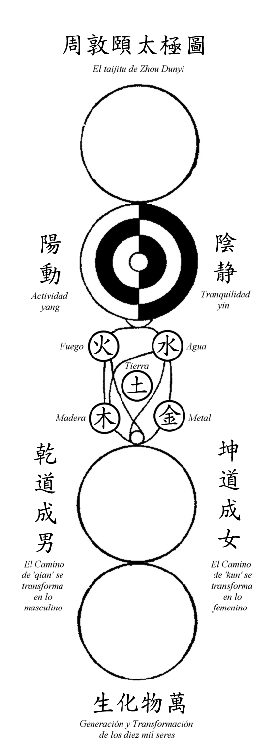 El taijitu (diagrama del yin y yang) de Zhou Dunyi, con caracteres chinos traducidos al castellano.